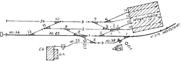 Gleisplan des OEG-Bahnhofs Heddesheim aus der SbV von 1961